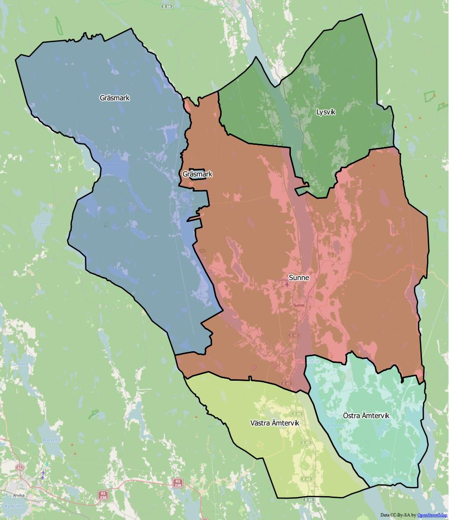 Distriktsindelningen i Sunne kommun World file: 109.84925832922405675 0 0 -109.84925832922405675 1397643.2310979263857007 8430101.69357562810182571